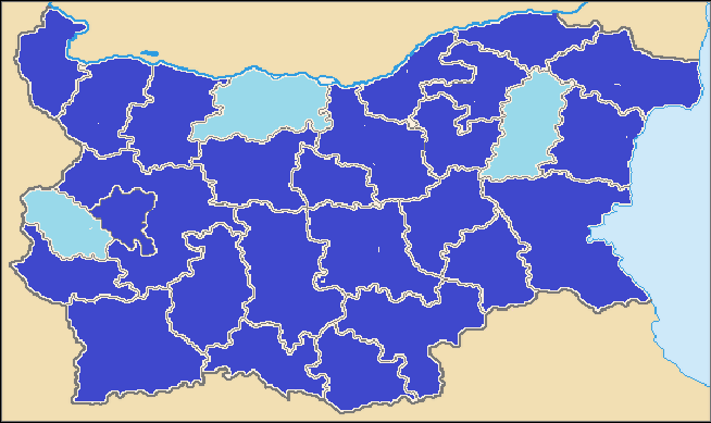 Олимпиада по БЕЛ 2014